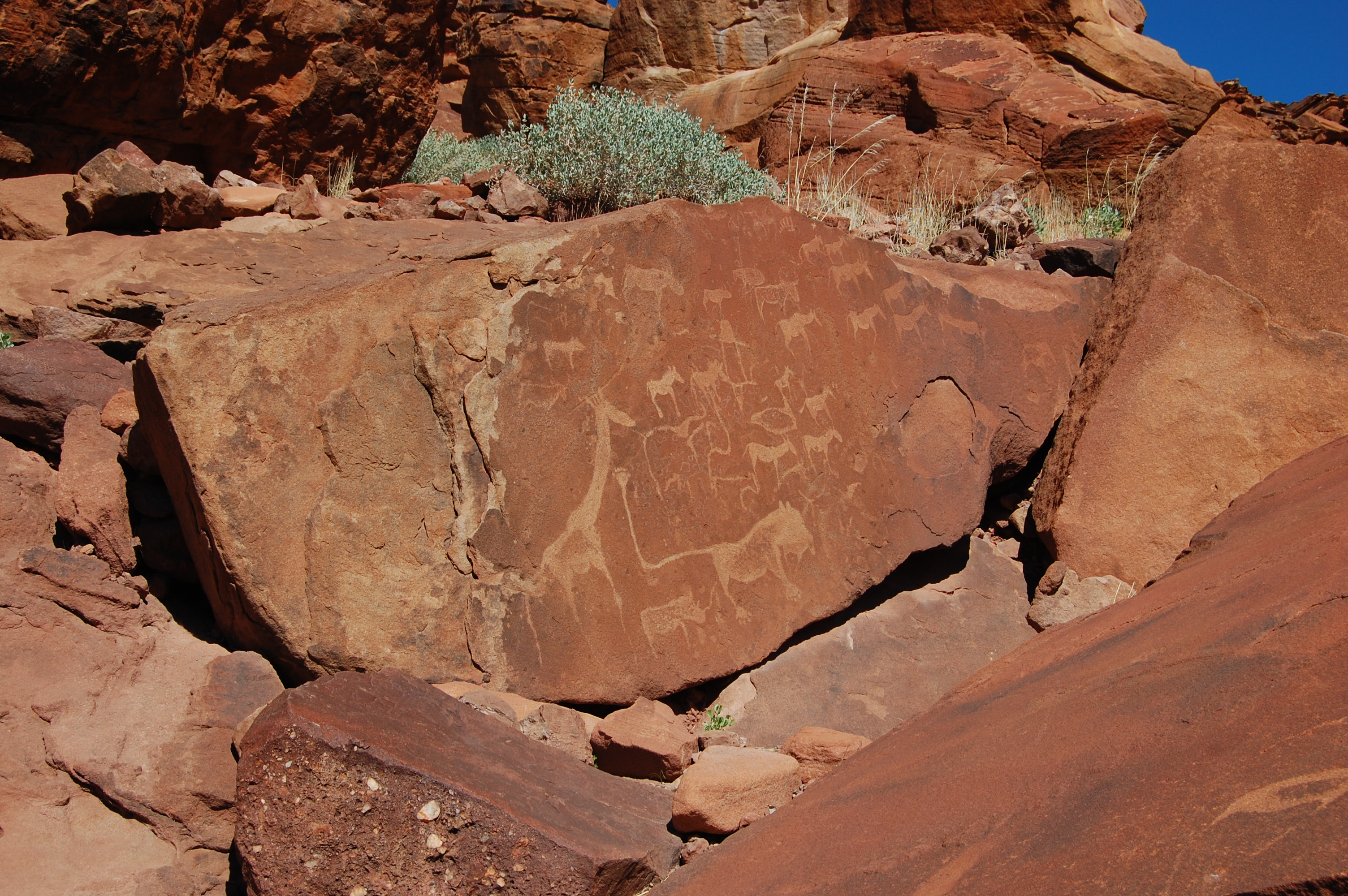 Felszeichnungen von Twyfelfontein, Namibia - „Löwenplatte“ (Petroglyph)